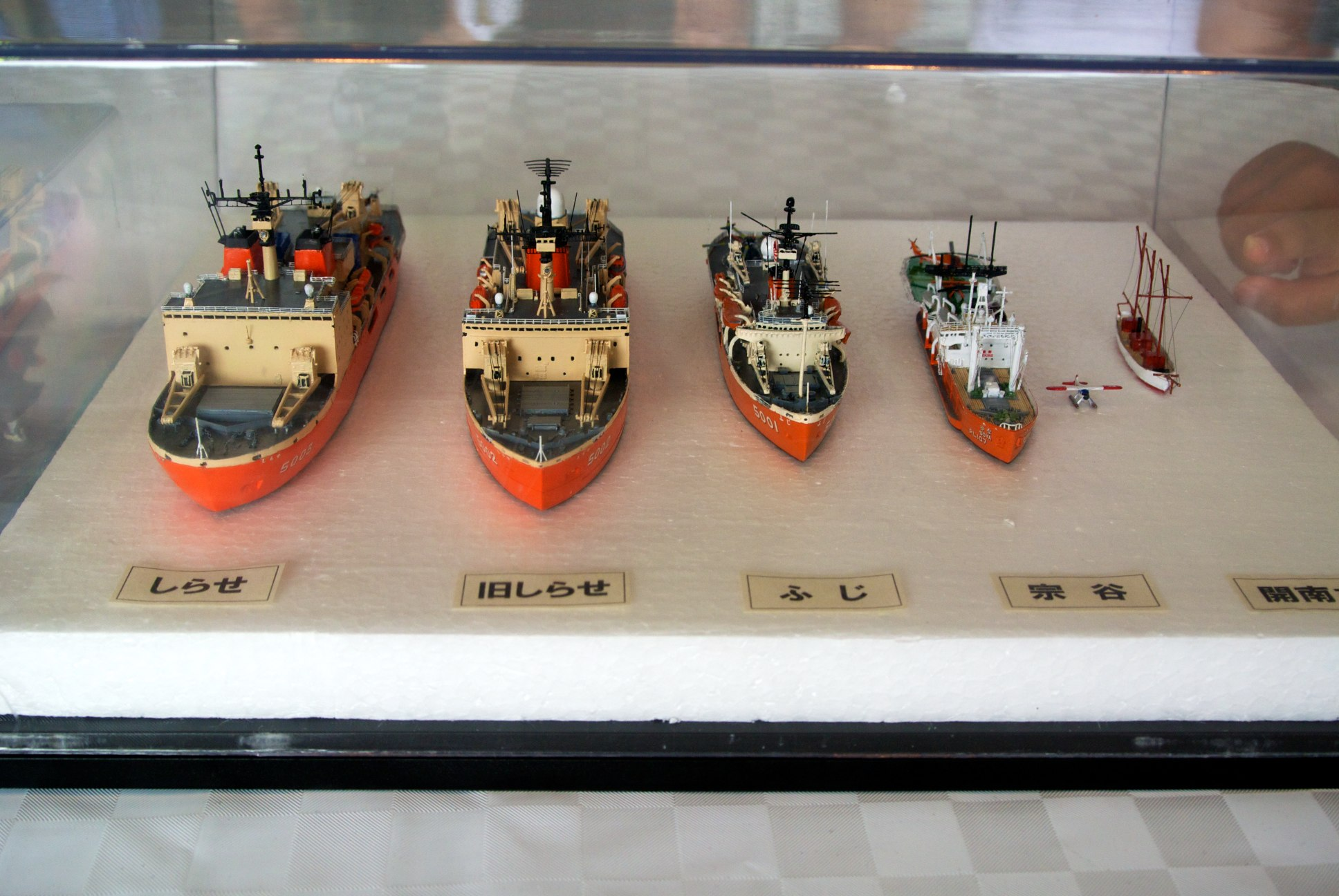 Icebreaker SHIRASE / しらせ：歴代の南極観測船 Nikon 1 J1 + 1 Nikkor VR 10-30mm f/3.5-5.6